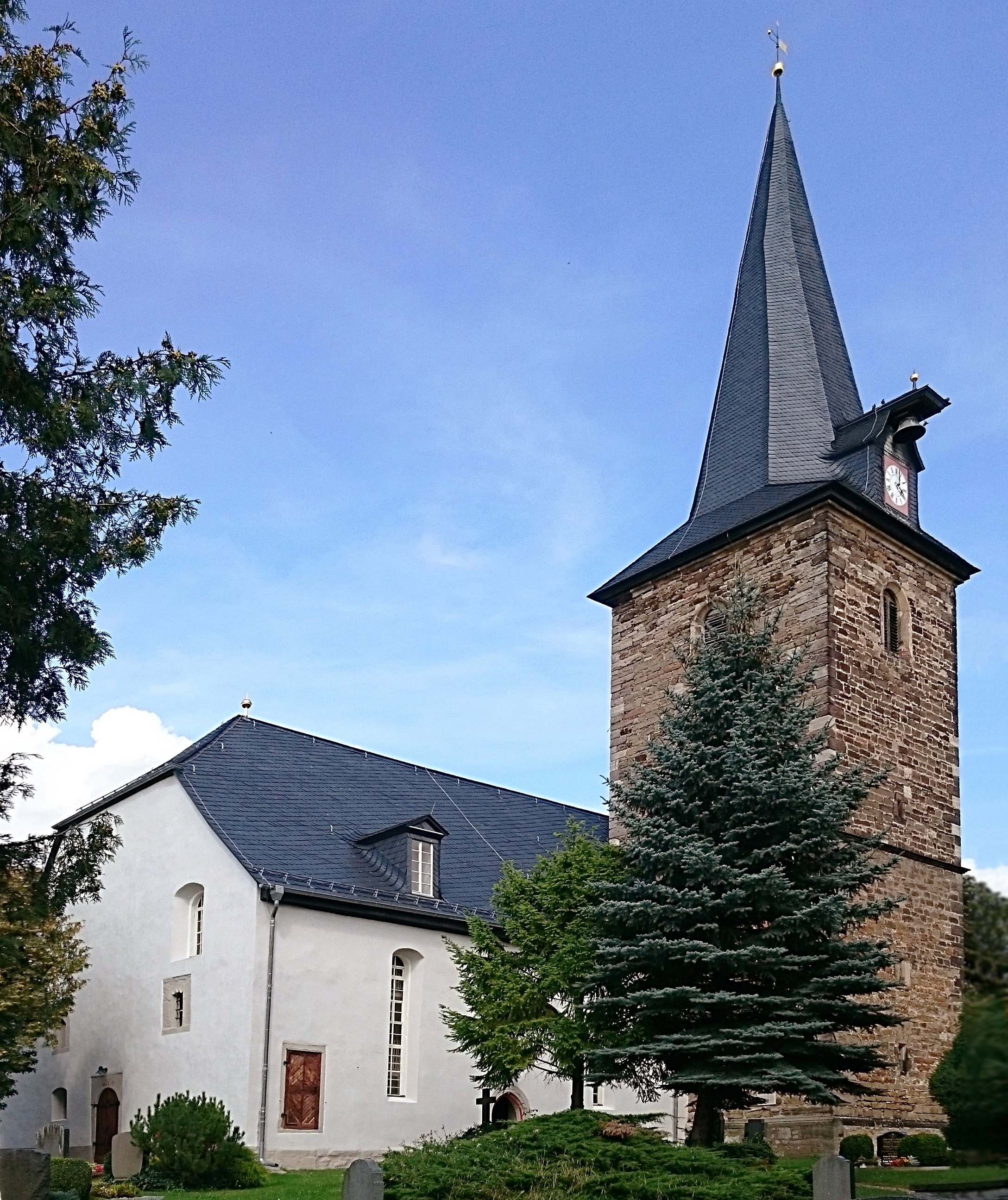 Dorfkirche St. Laurentius in Kirchheim (Thüringen)